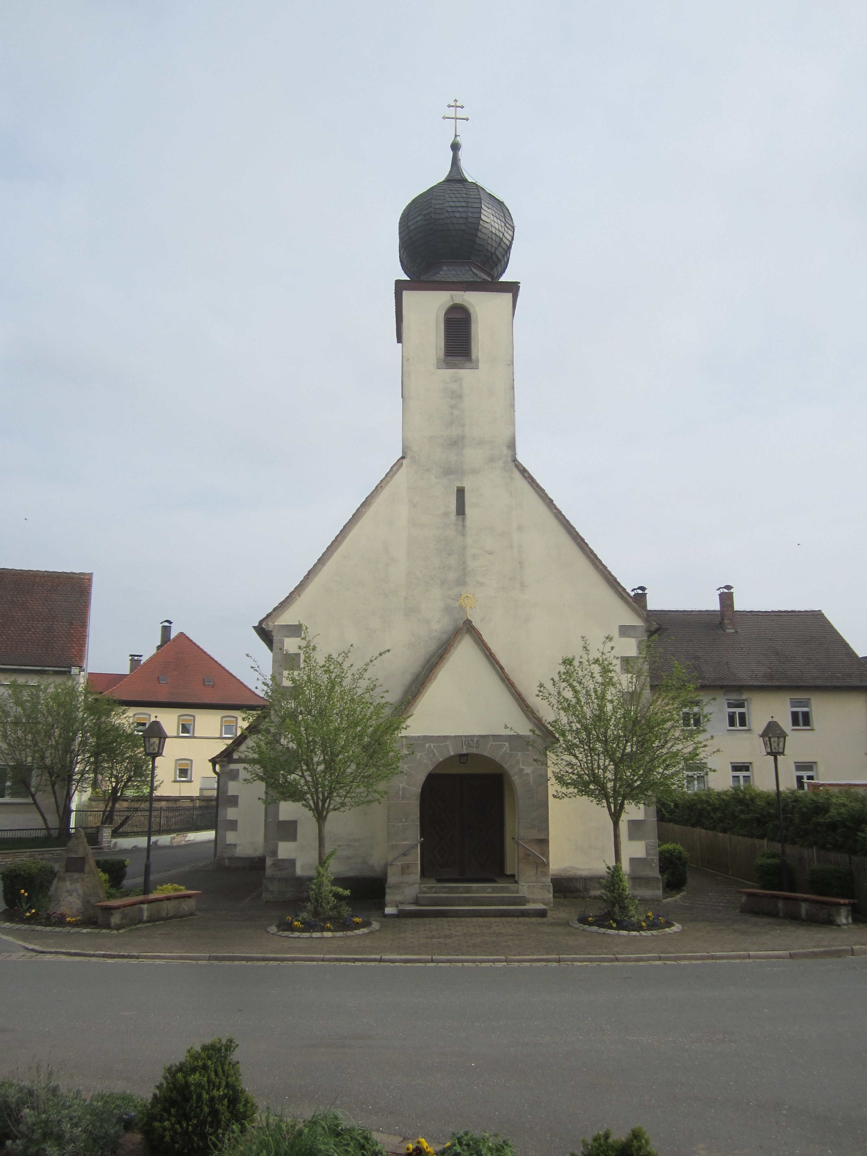 Weppersdorfer Kapelle im Jahr 2013 wurde 1925 erbaut und hat eine schöne Ausstattung